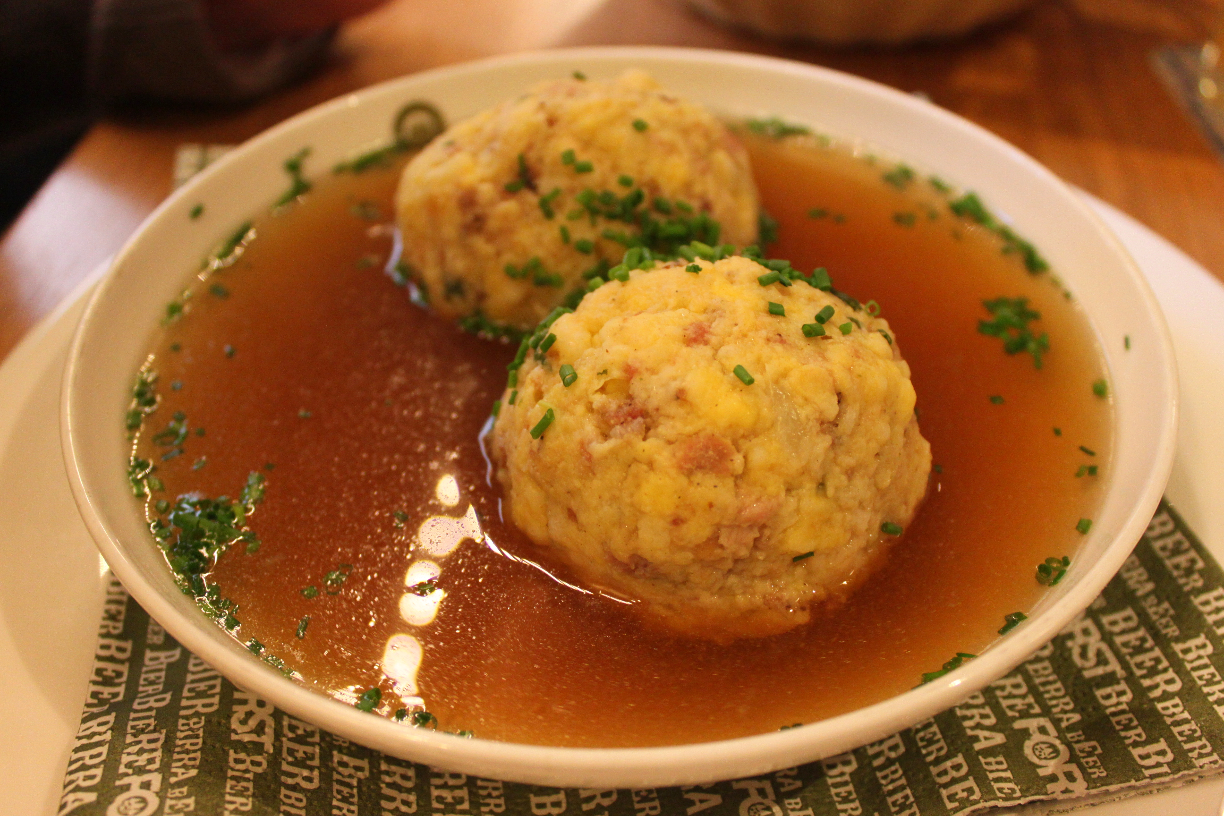 Speckknödel in Brühe, in der Brauerei Forst in Algund